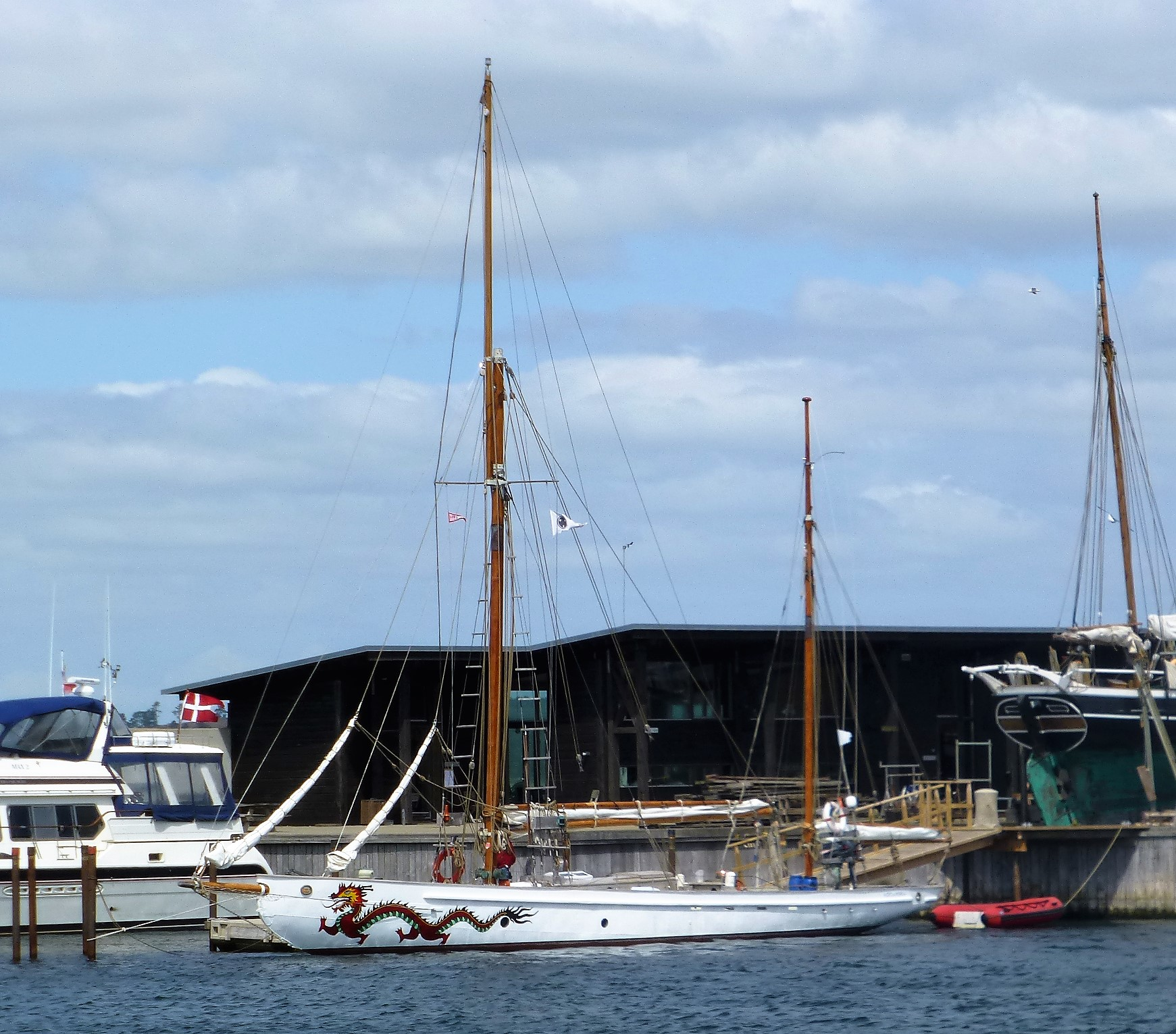 Troels Kløvedals skib Nordkaperen i træskibshavnen i Ebeltoft